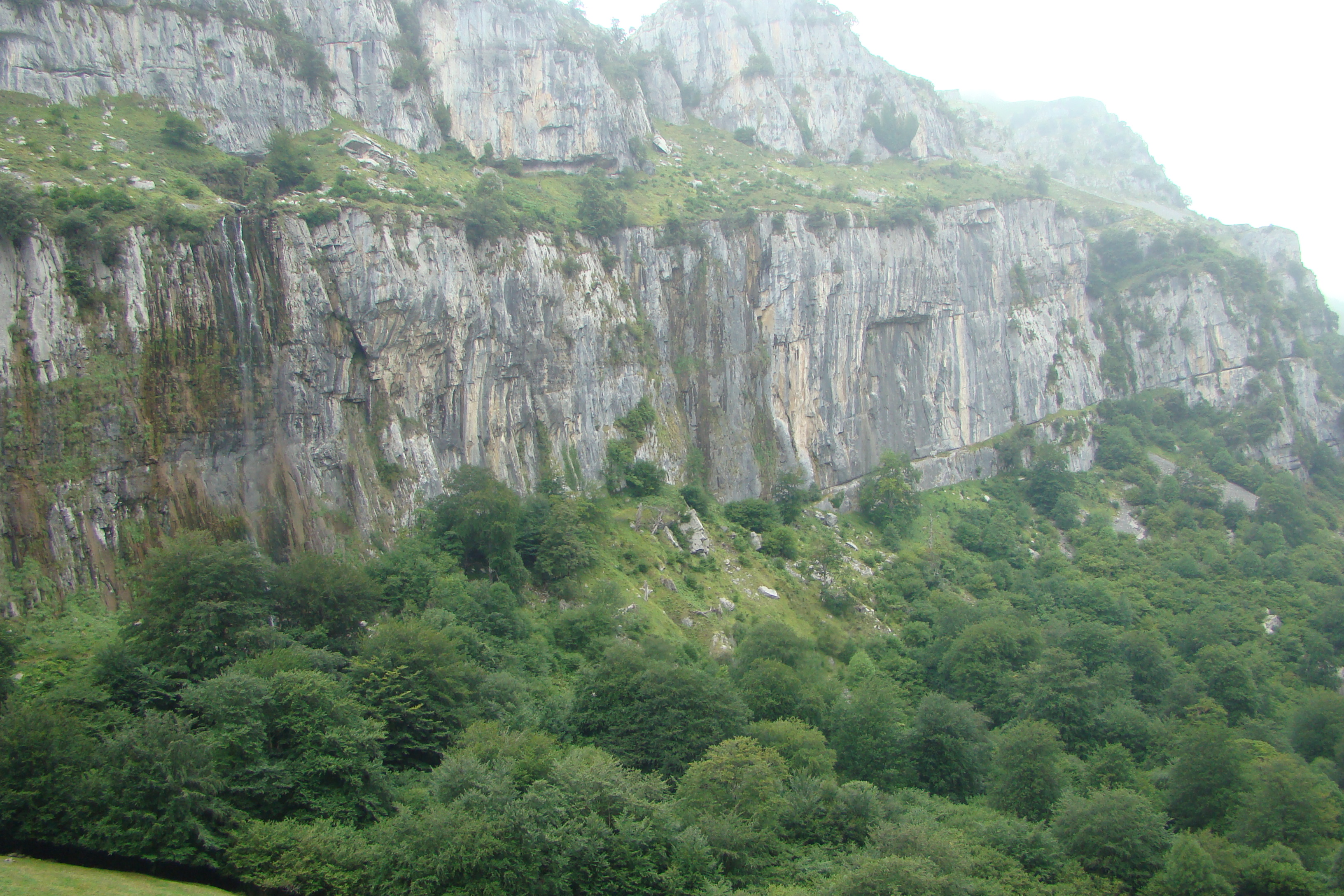 Nacimiento del rio Asón (Soba)